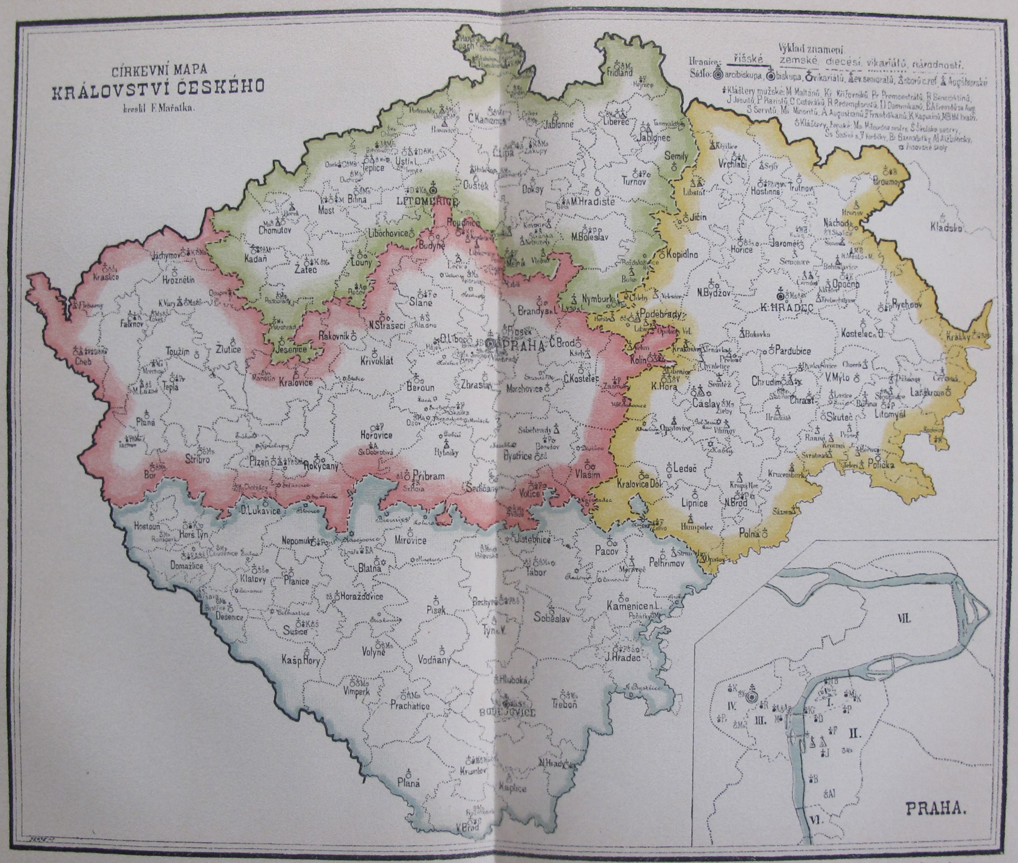 Církevní mapa Království českého kreslil F. Mařatka.